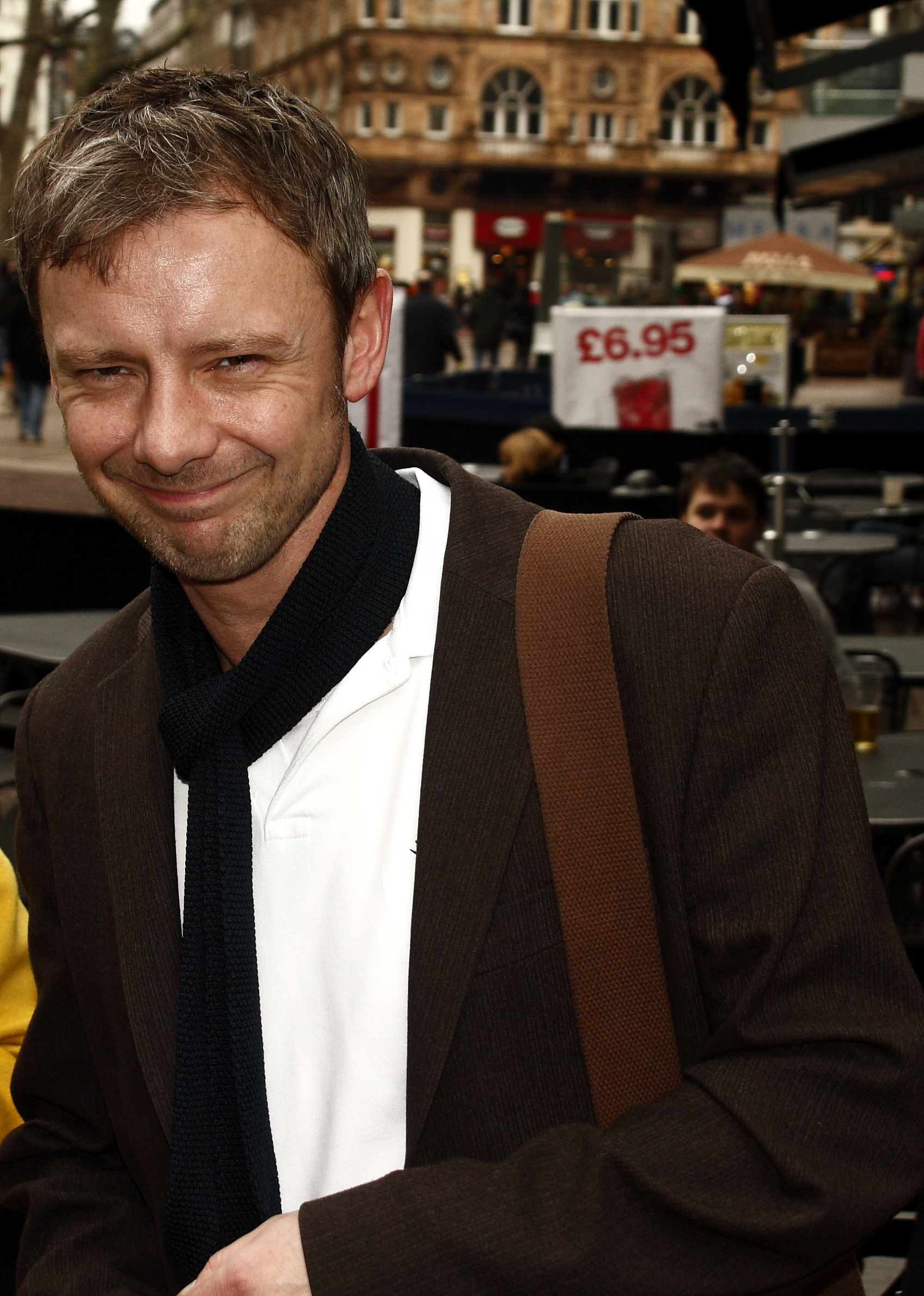 John Simm